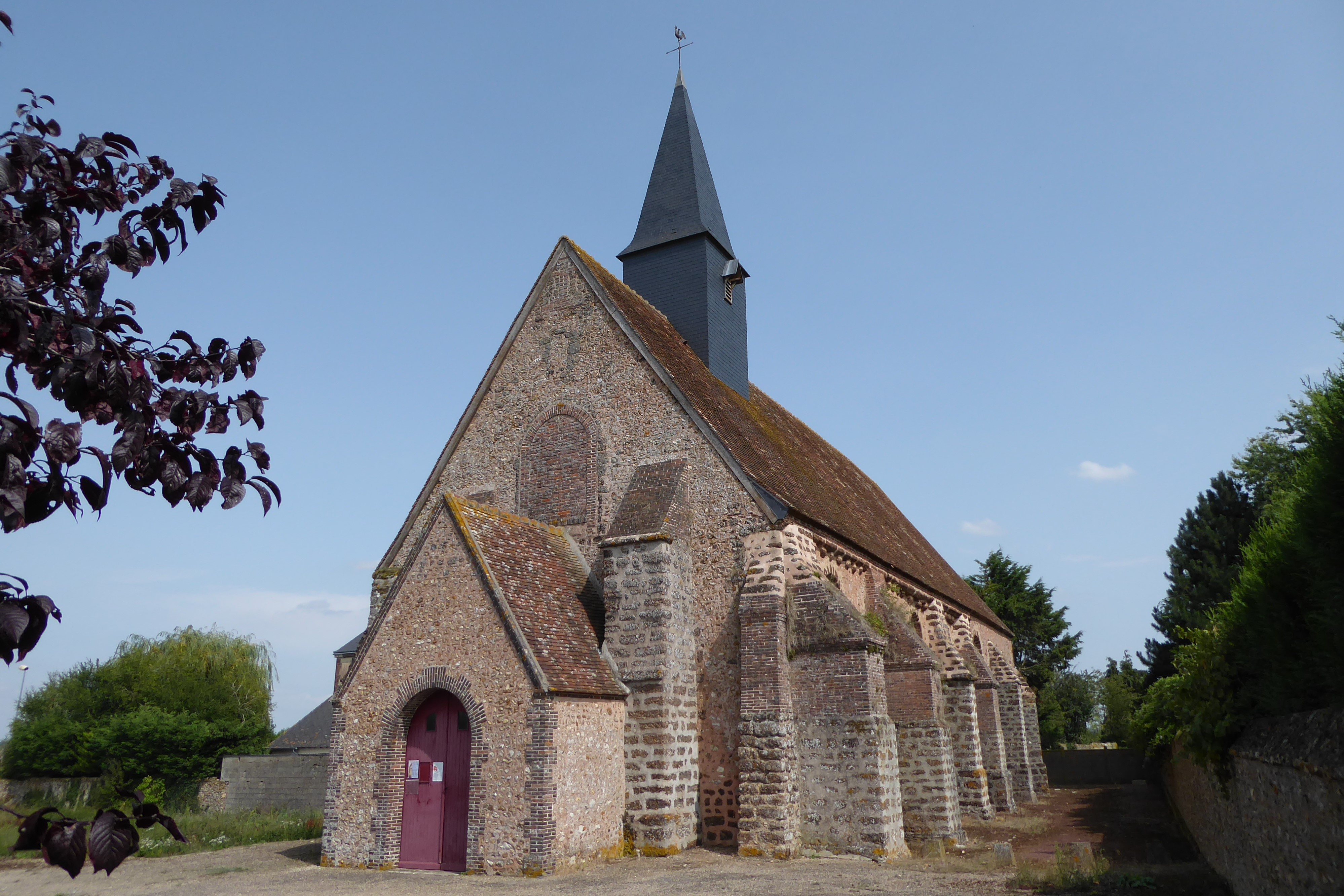 église Saint-Martin façade ouest, Billancelles, Eure-et-Loir, France.